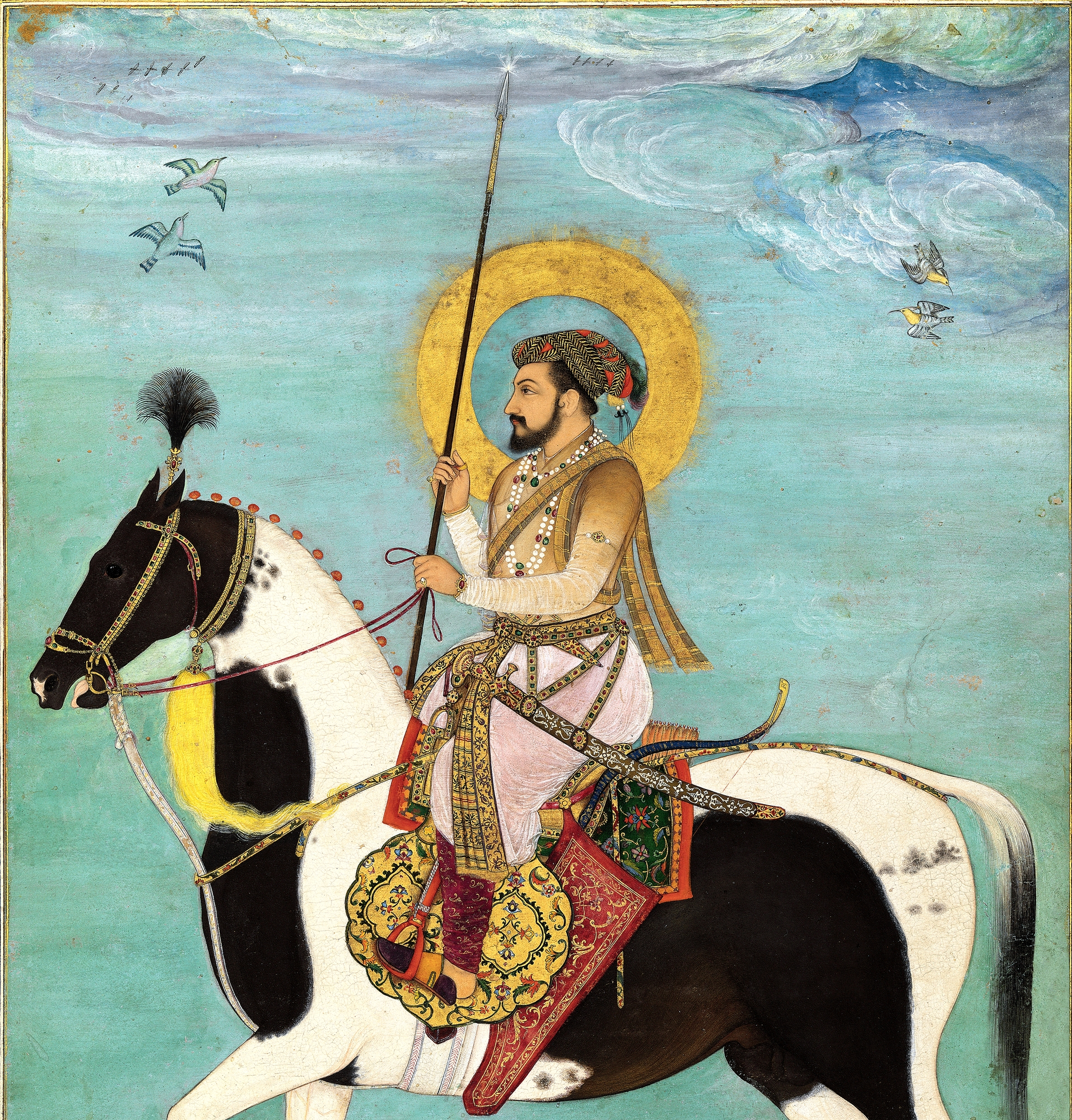 Album leaf; Codices